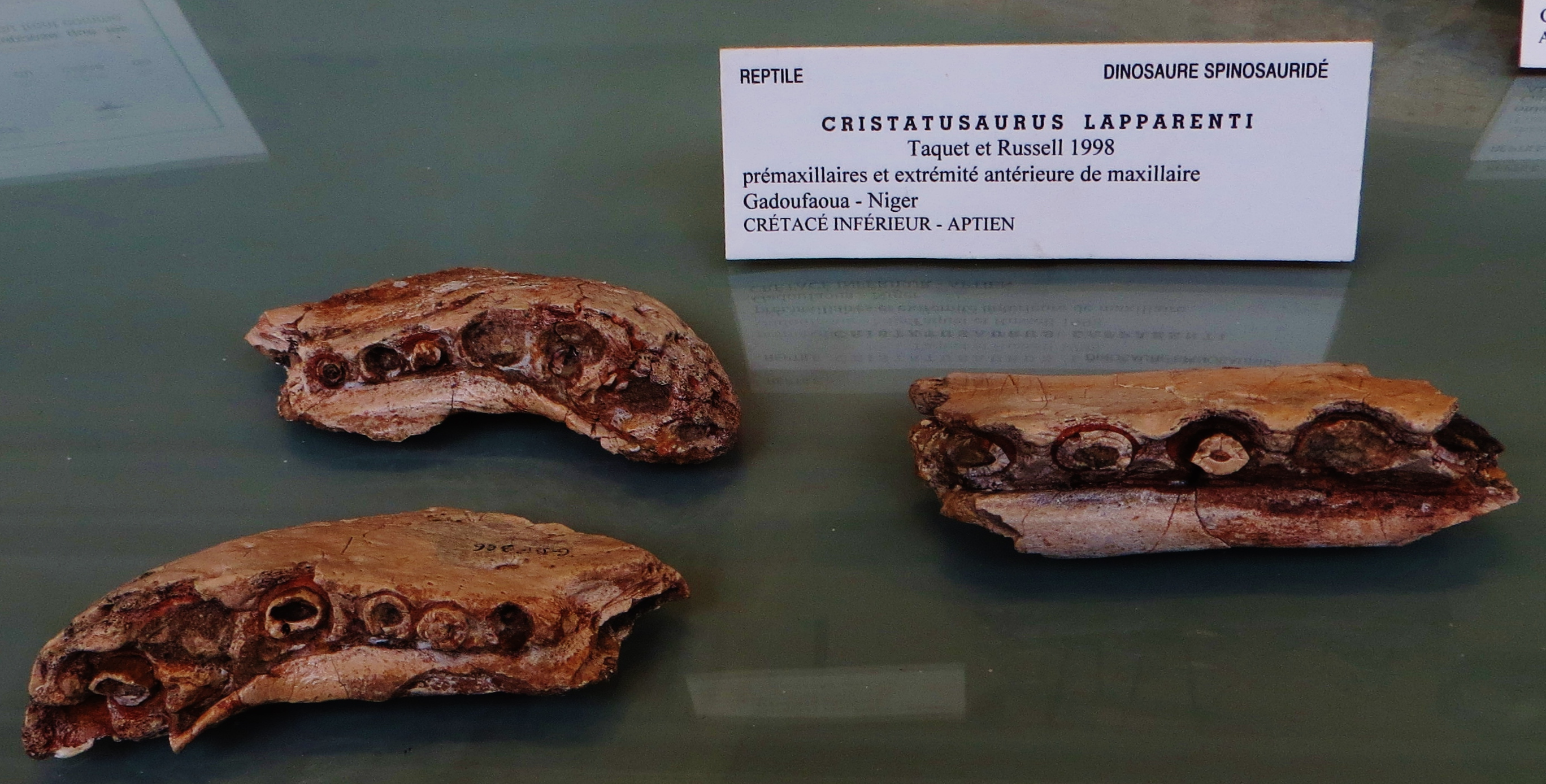 Fossil of Cristatusaurus, an extinct reptile- Took the photo at Musee d'Histoire Naturelle, Paris